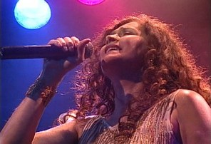 Cantora brasileira Joanna em imagem do acervo da TV Brasil.